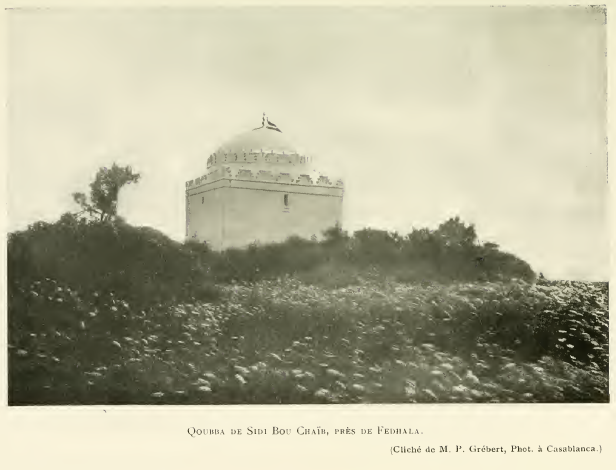 Koubba de Sidi Bou Chaïb